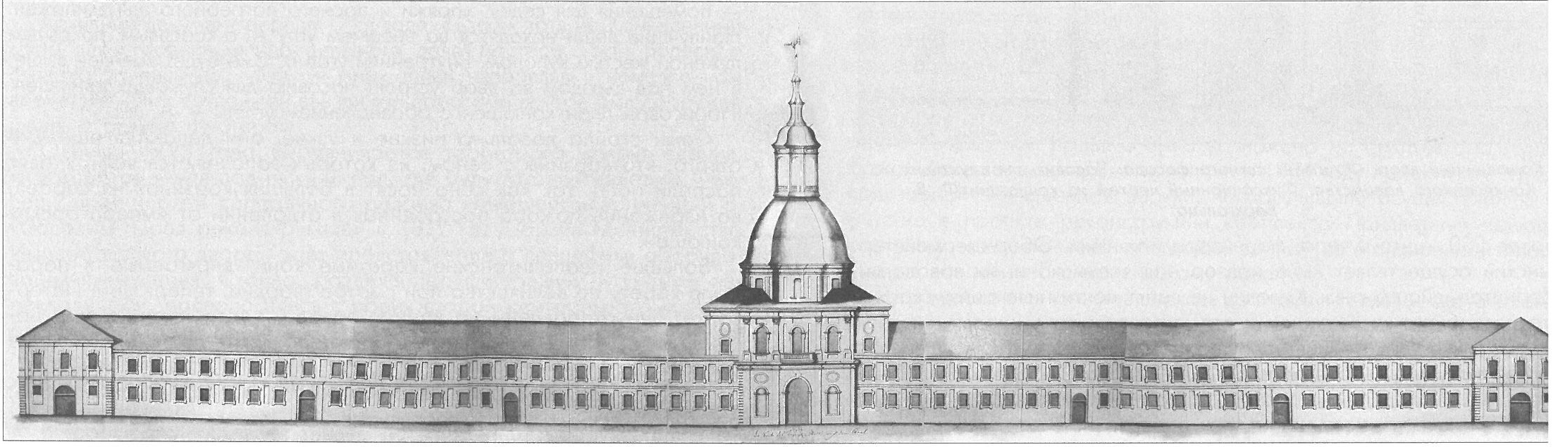 Конюшенный двор. Фрагмент северного главного фасада. Арх. Н. Ф. Гербель. Фиксационный чертёж из коллекции Ф. В. Берхгольца. 1740-е гг, НМС.